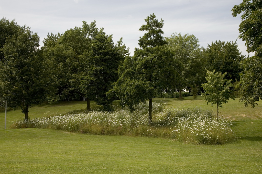 Foyer Laekenois, jardin en mouvement.